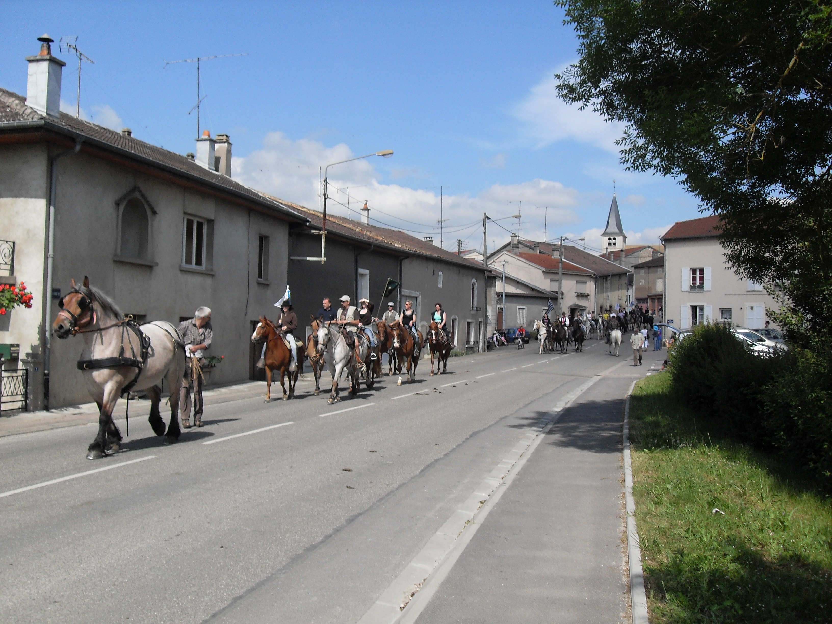 Pagny-sur-Meuse Meuse (55) - L'entrée du village côté Lay-Saint-Remy un jour de fête, avec une parade de cavaliers. Au fond le clocher de l'église.